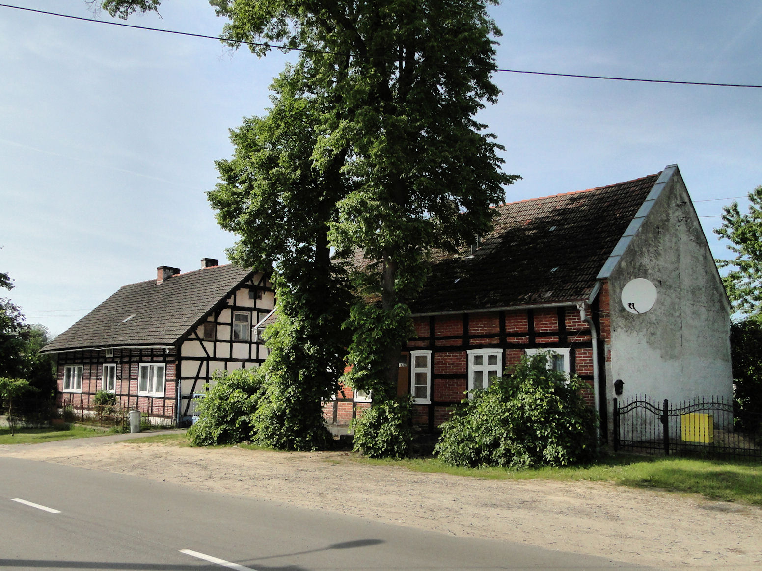 Szczecin Jezierzyce